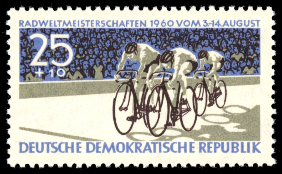 Information Information: Ausgabepreis: Pfennig First Day of Issue / Erstausgabetag: Auflage: Entwurf: Druckverfahren: Michel-Katalog-Nr: Ländercode-MiNr